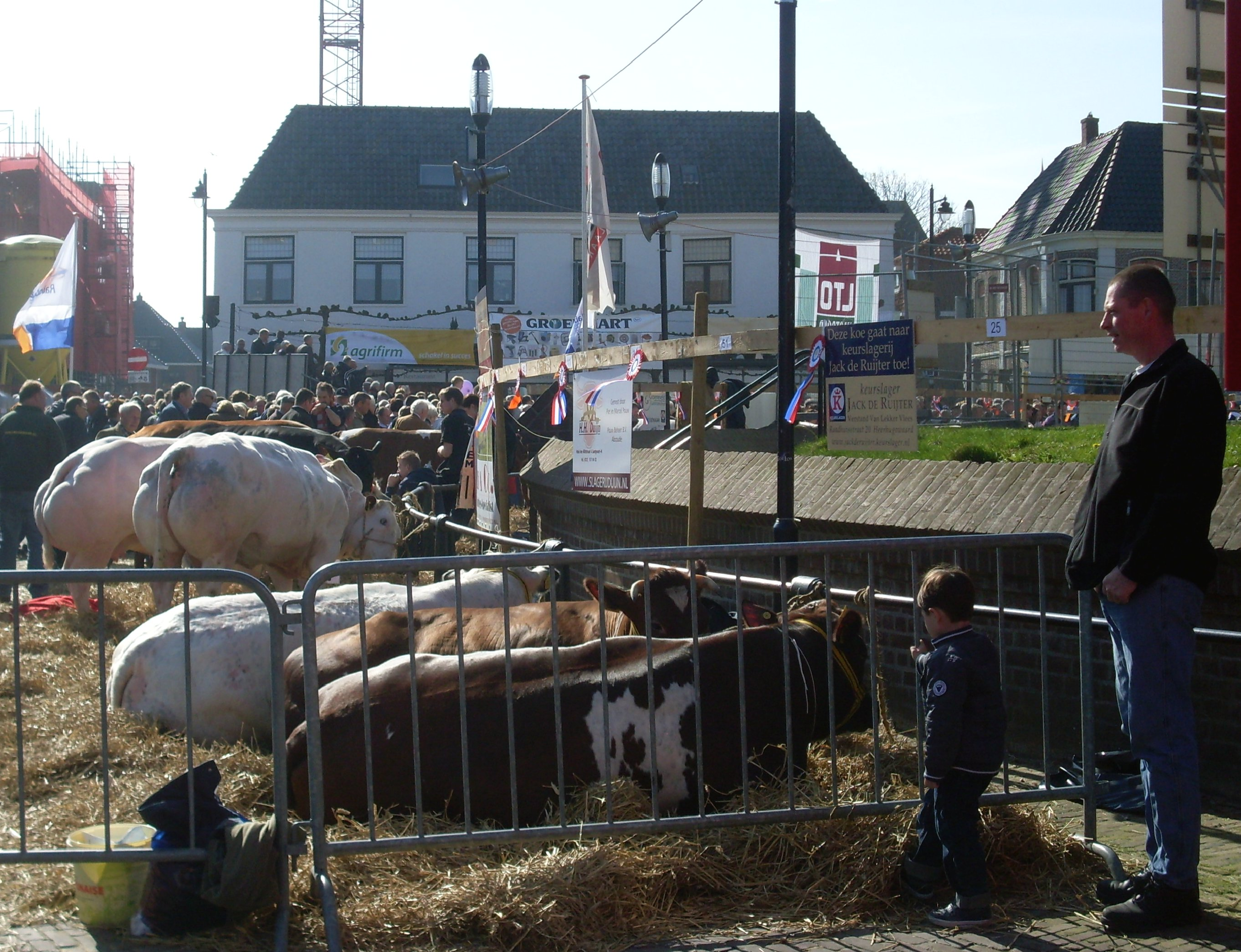 Dikbillen in Schagen